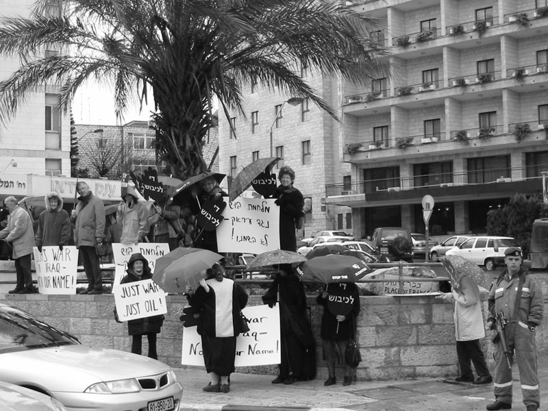 "Women In Black" protestieren gegen die Israelische Besatzungspolitik und den drohenden Irak-Krieg